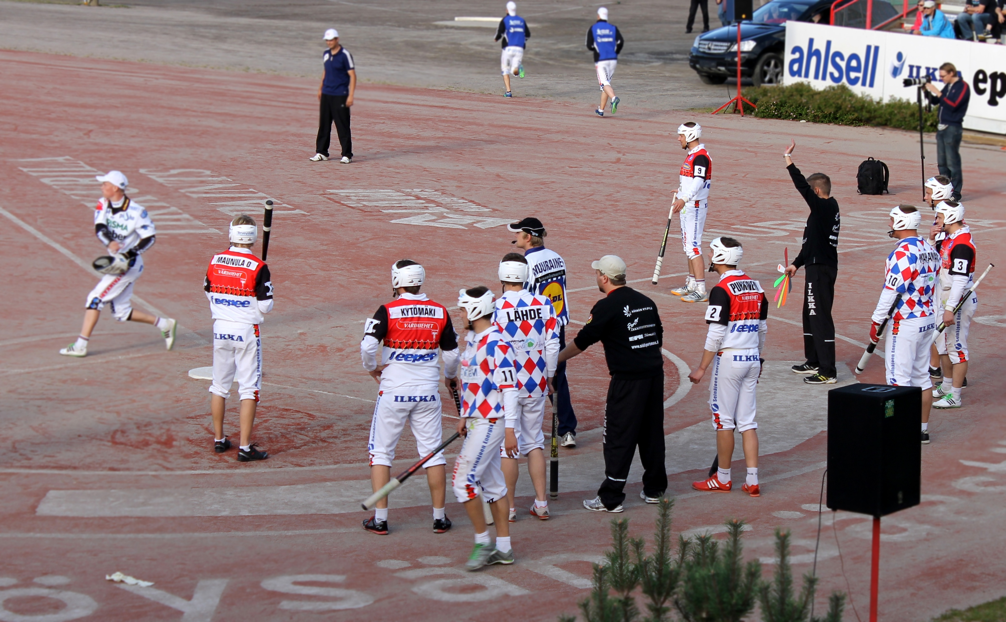 Maila-Jussien pelaajia Superpesiskarsintaottelussa Nurmoa vastaan 25. elokuuta 2012